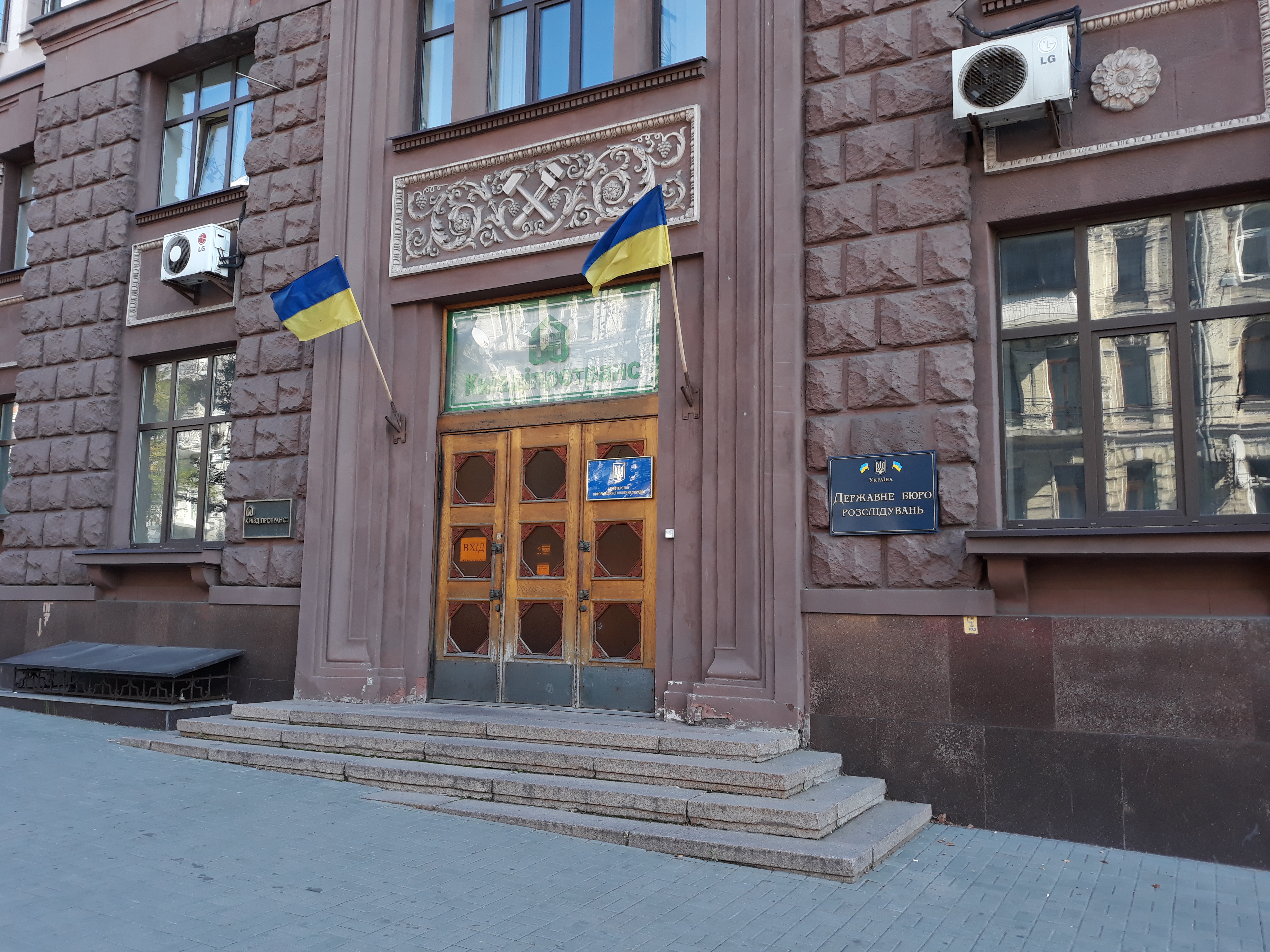 м. Київ, вулиця Симона Петлюри, 15. Державне бюро розслідувань